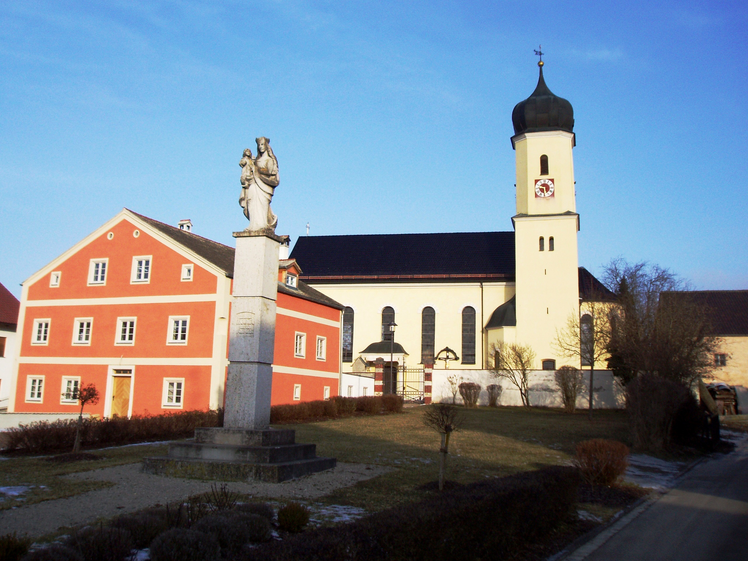 Kirche von Hofstetten im Landkreis Eichstätt (Oberbayern) This is a photograph of an architectural monument. This is a photograph of an architectural monument.